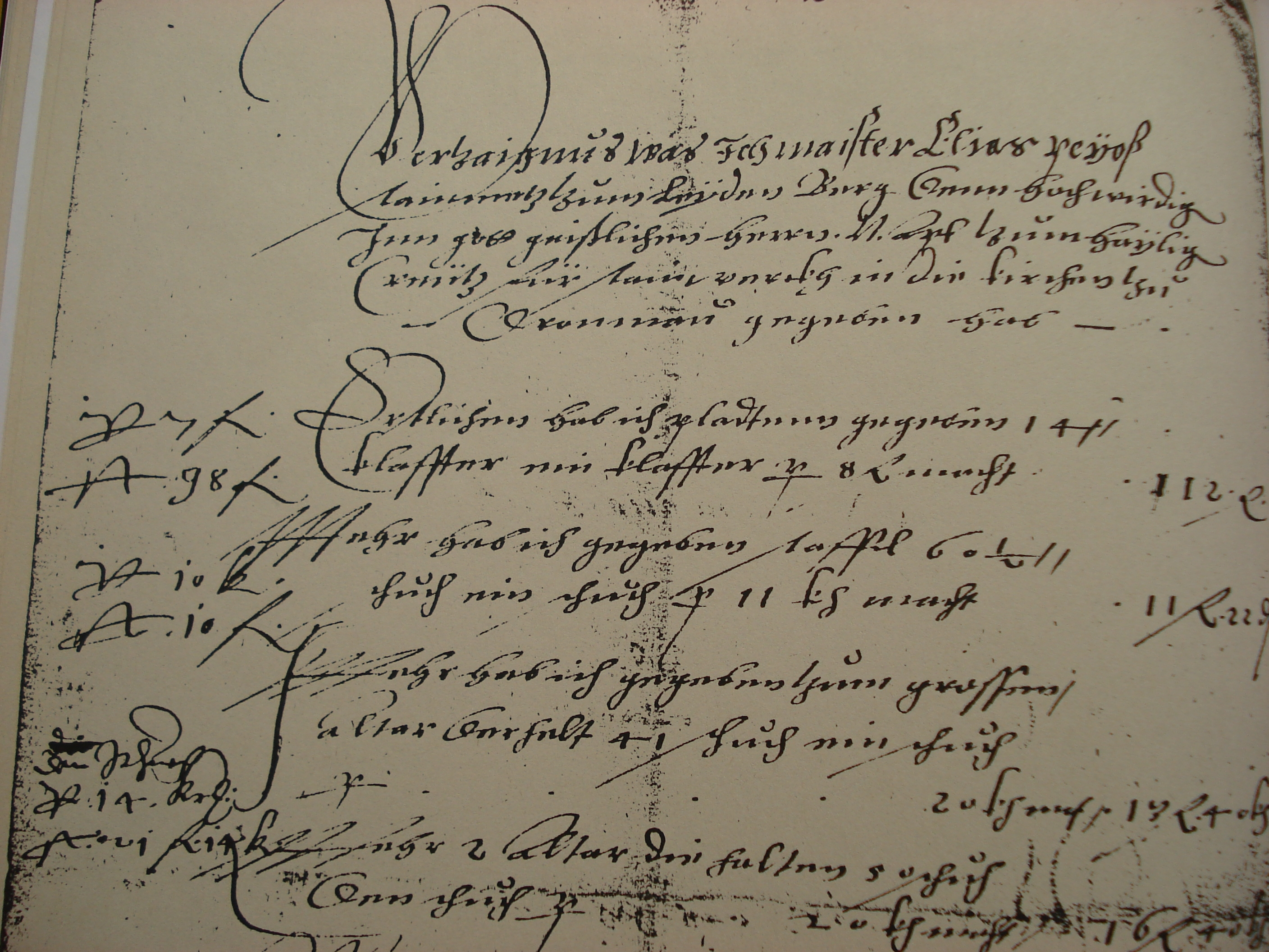 Steinmetzrechnung von Elias Payos: Kirche zu Trumau